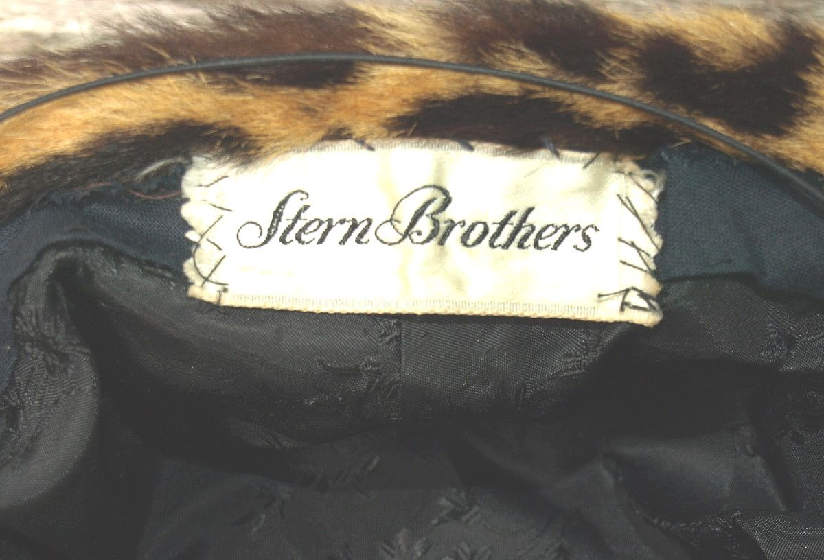 Einnähetikett in einer Damenkappe aus Jaguarfell, Stern Brothers (zweite Hälfte 20. Jahrhundert.